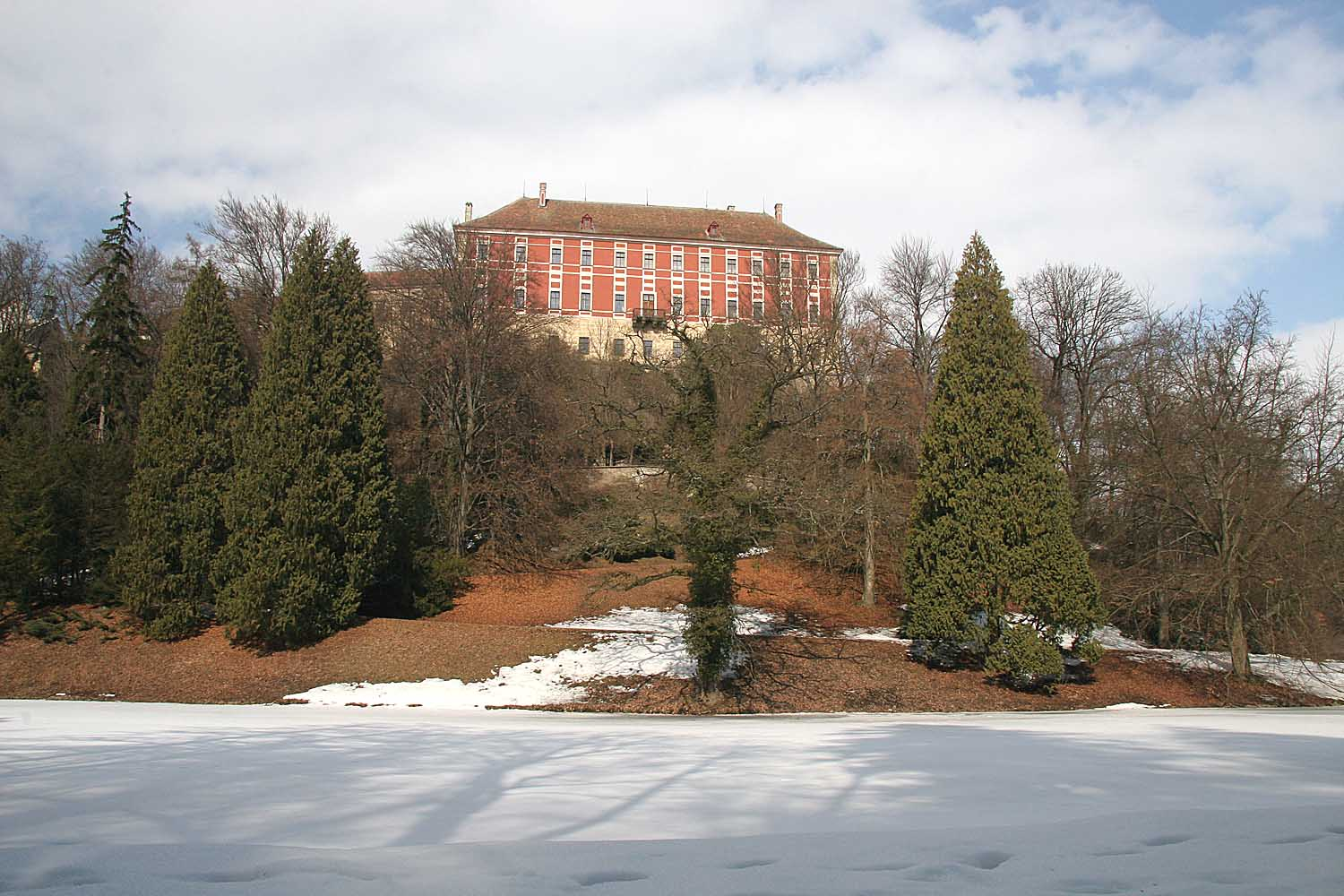 Opočno, zámek z parku, district Hradec Králové, Czech Republic autor: Prazak date: 23. 3. 2006